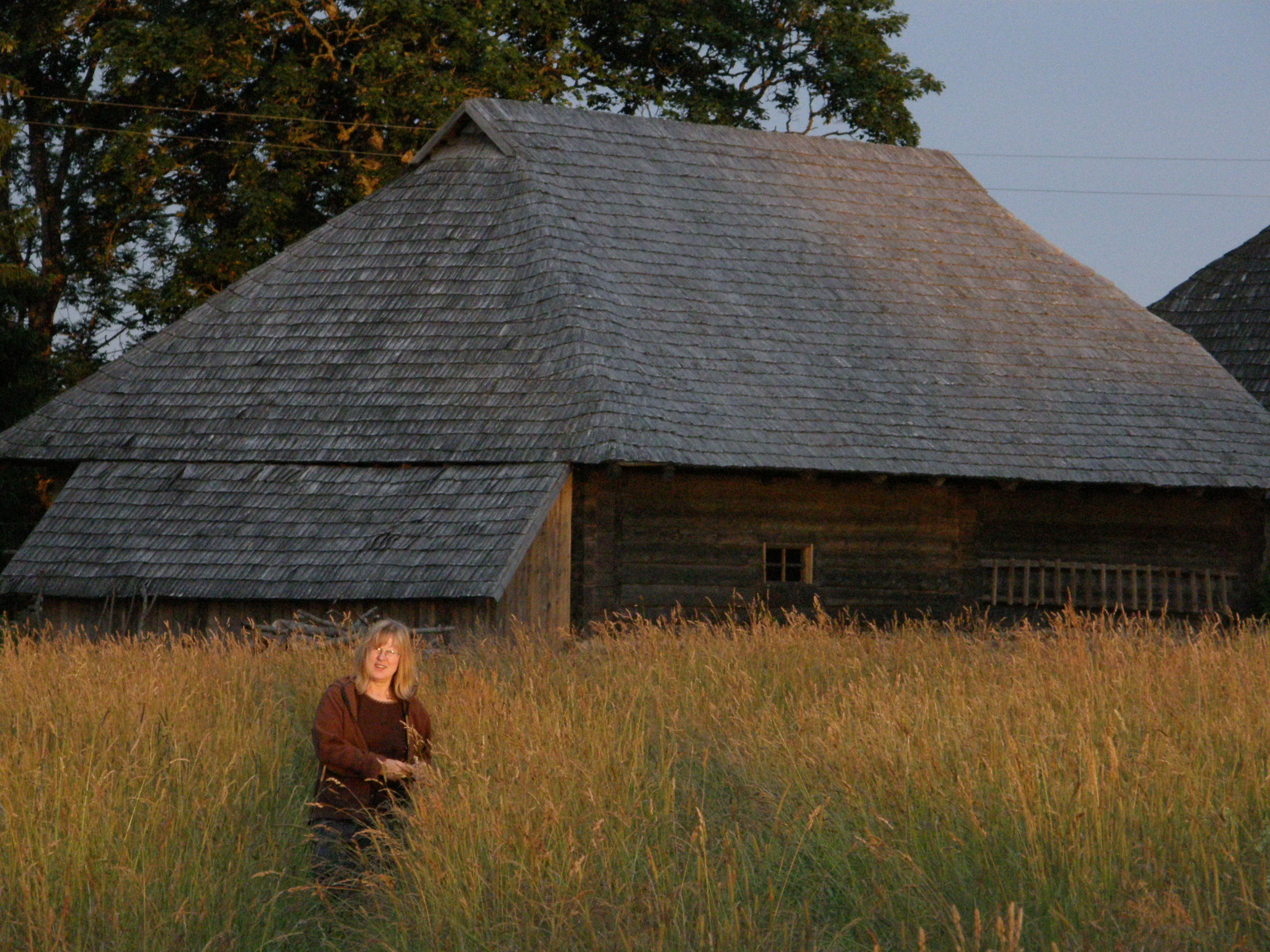 Near Lejas-Vēveri